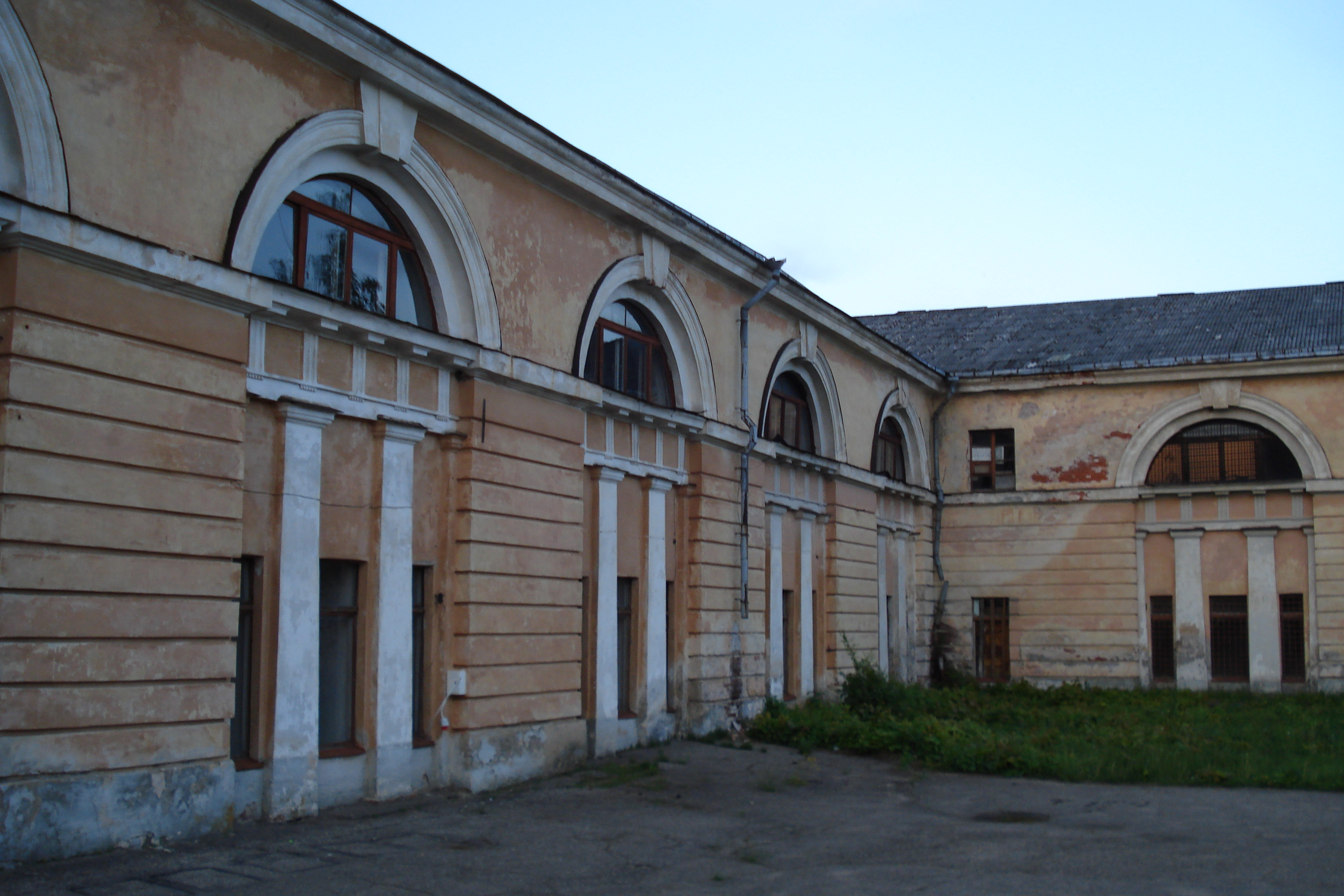 Artillery arsenal in the Dinaburg fortress. Артиллерийский арсенал в Динабургской крепости